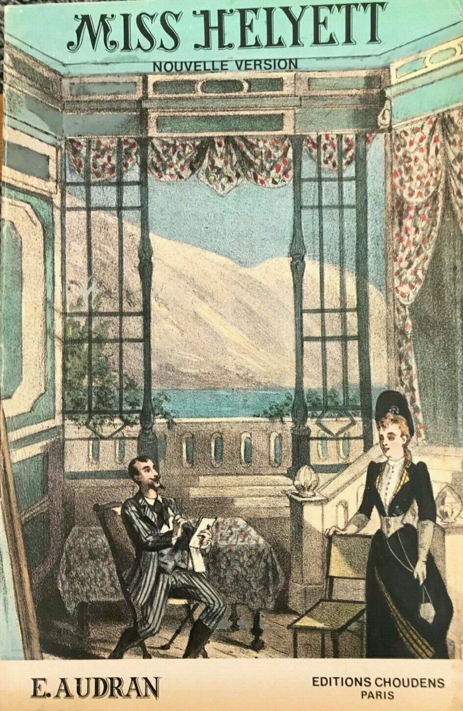 Couverture de la partition de l'opérette Miss Helyett 1890.